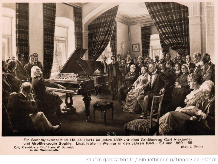 Ein Sonntagskonzert im Hause Liszts im Jahre 1882 vor dem Grossherzog Carl Alexander und Grossherzogin Sophie